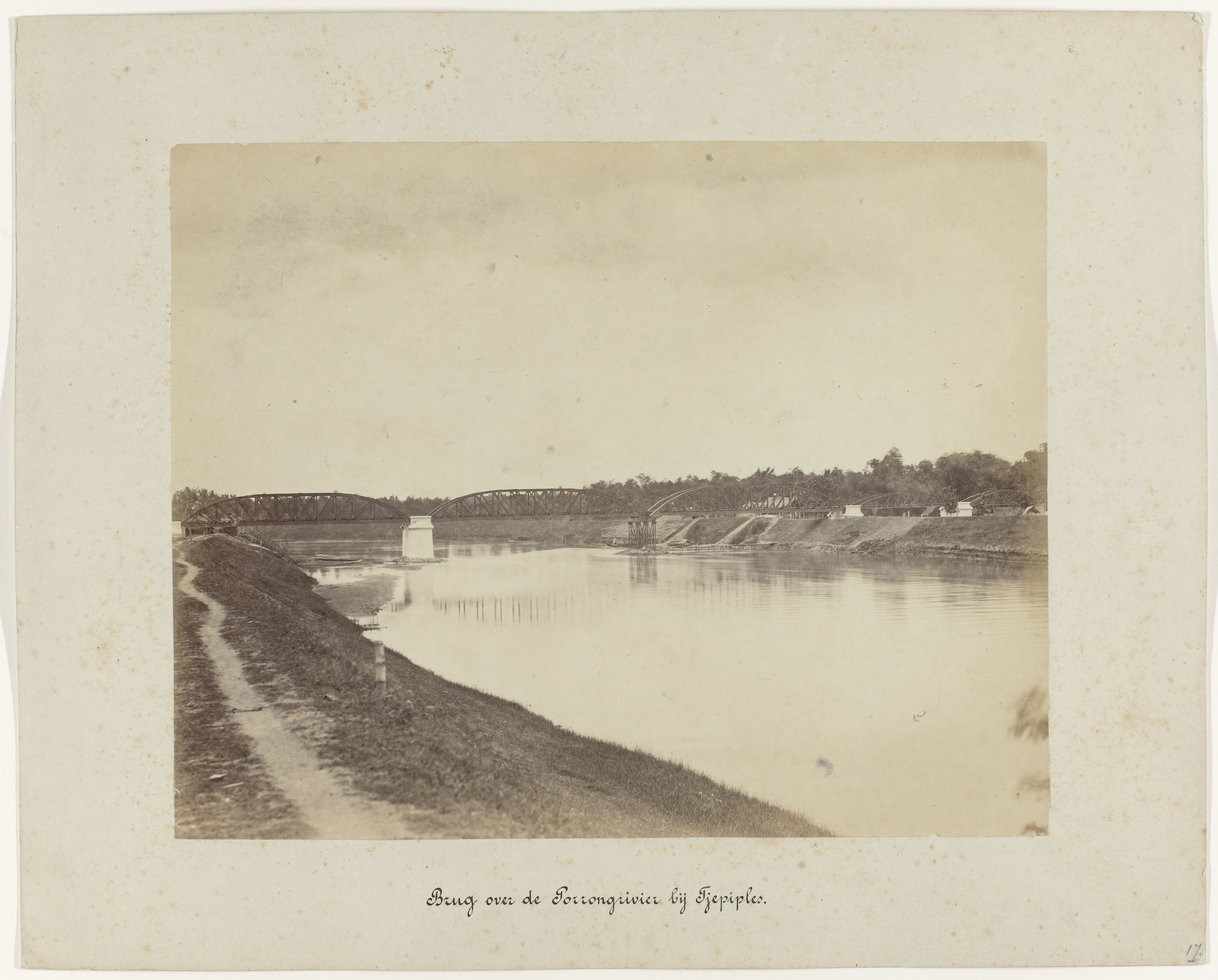 IdentificatieTitel(s): Brug over de Porrongrivier bij Tjepiples / bij Modjokerto (titel op object)Staatsspoorwegen op Java (serietitel)Objecttype: foto Objectnummer: NG-1988-26-30Omschrijving: Gezicht op de brug over de Porrongrivier nabij Tjepiples en Modjokerto. Onderdeel van een groep van 62 foto's in een doos met het opschrift "Staatsspoorwegen op Java" uit 1888.VervaardigingVervaardiger: fotograaf: anoniemPlaats vervaardiging: JavaDatering: 1880 - 1888Fysieke kenmerken: albuminedrukMateriaal: fotopapier Techniek: albuminedrukAfmetingen: foto: h 218 mm × b 275 mmOnderwerpWanneer: 1880 - 1888Waar: PorongMojokertoVerwerving en rechtenVerwerving: aankoop 30-aug-1988Copyright: Publiek domein